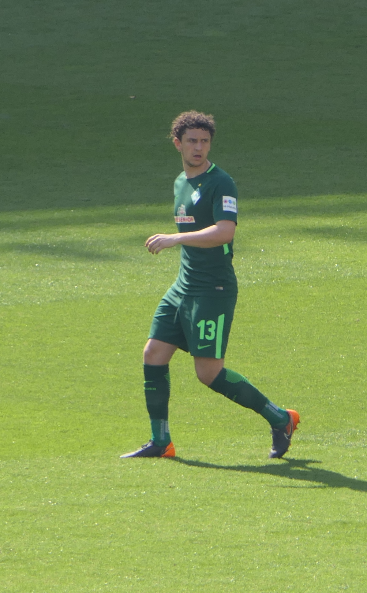 Der Fussballprofi Milos Veljkovic im Trikot vom SV Werder Bremen beim Auswärtsspiel gegen den VfB Stuttgart am 21.04.2018.